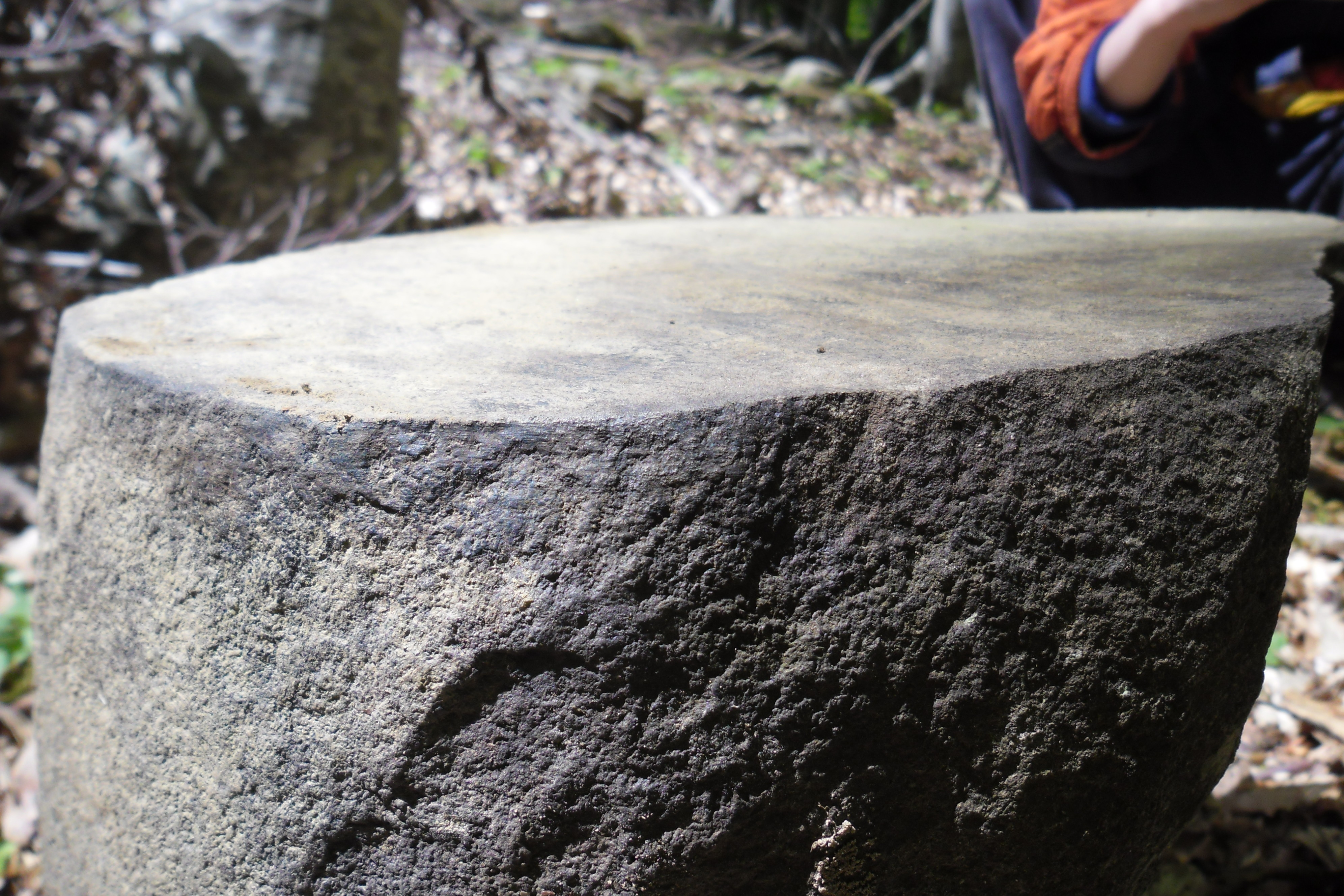 Фото